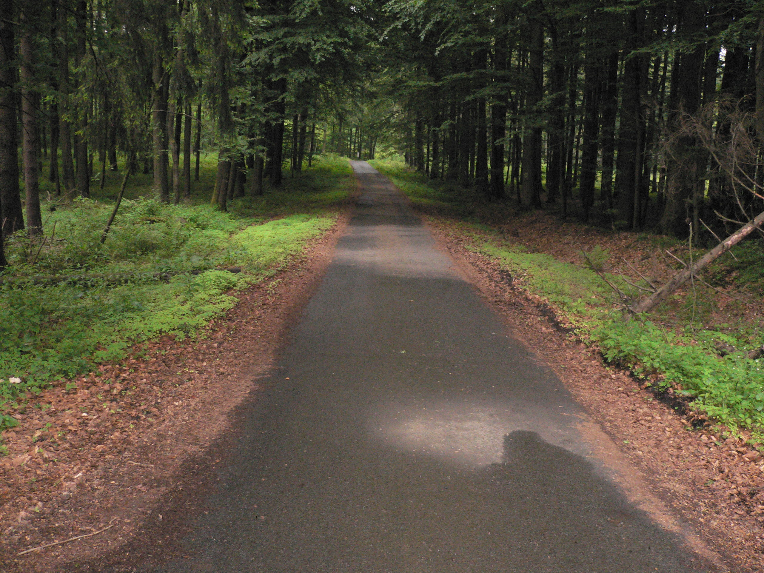 Heutiger Zustand der Herborner-Hohen-Straße zwischen Angelburg und Wilhelmsteine